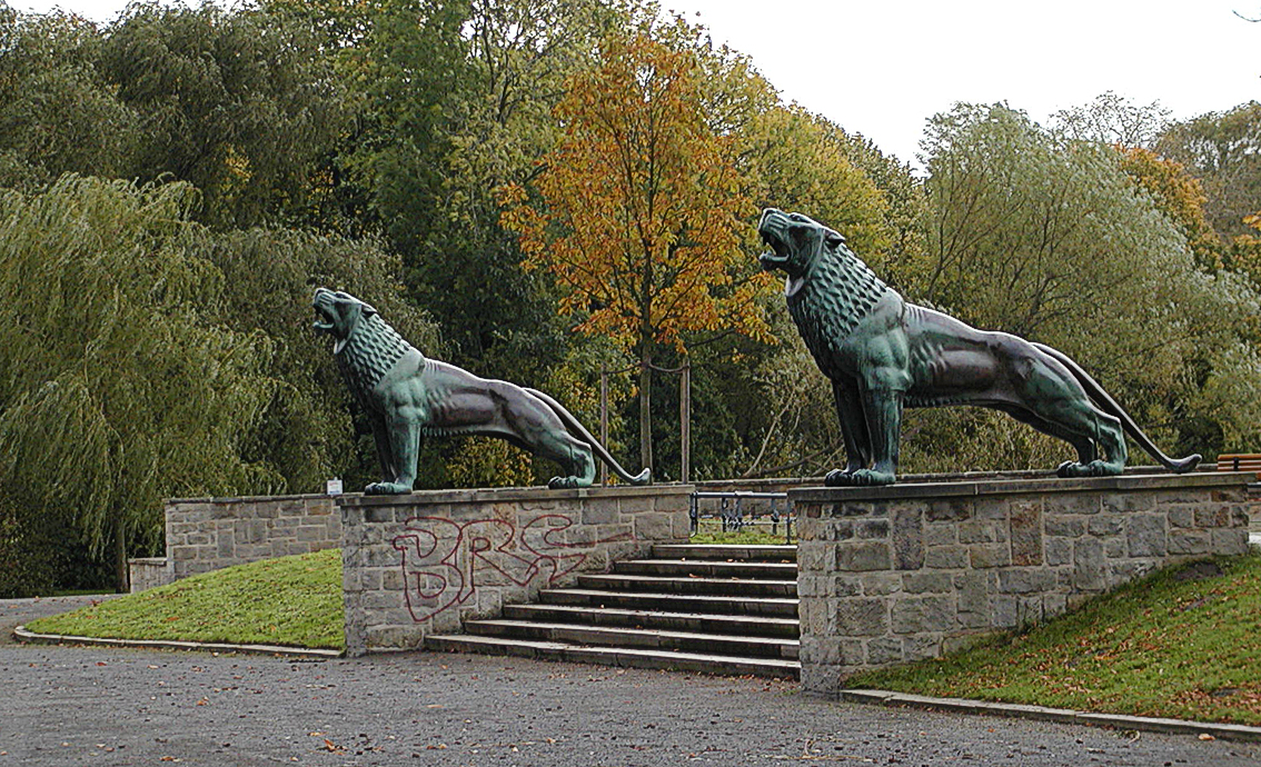 Die von Arno Breker 1938 geschaffene Löwen-Skulpturen an der so genannten Löwen-Bastion am Ostufers des Maschsees